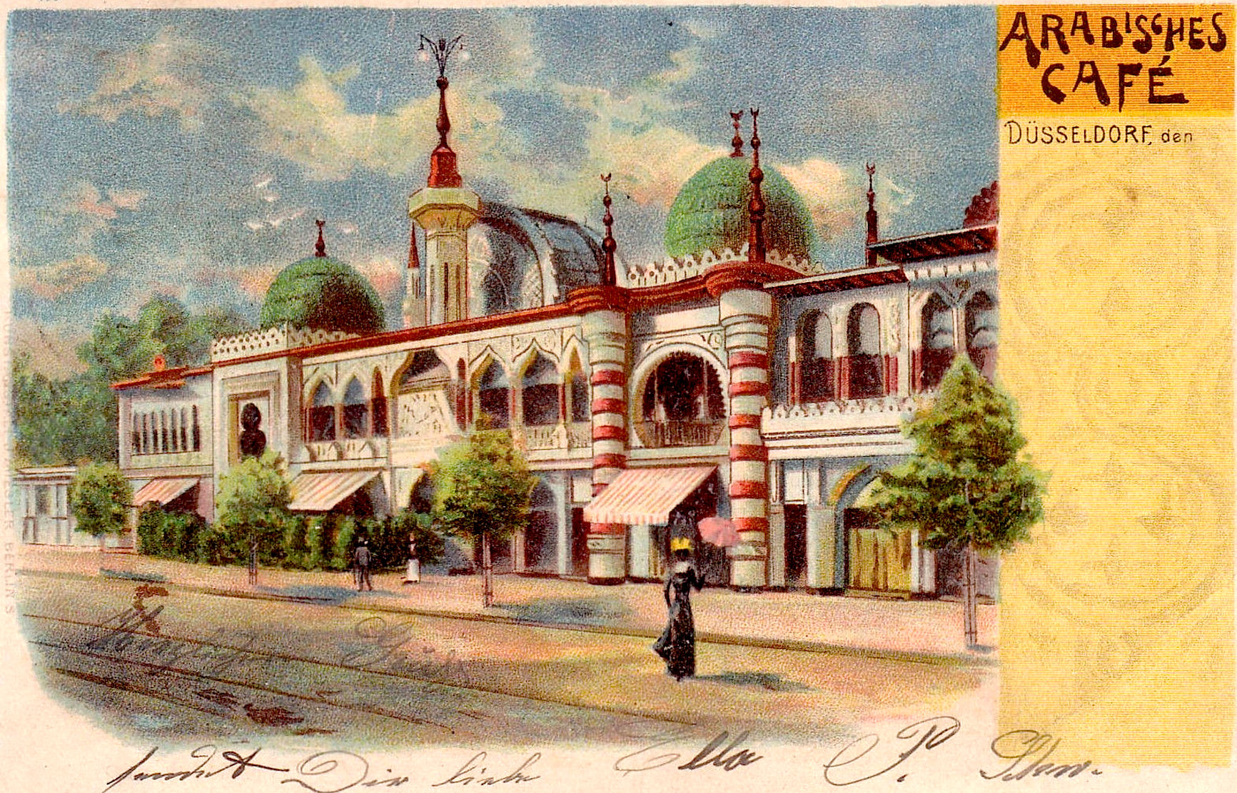 Арабское кафе, Дюссельдорф. Снесенный памятник архитектуры.